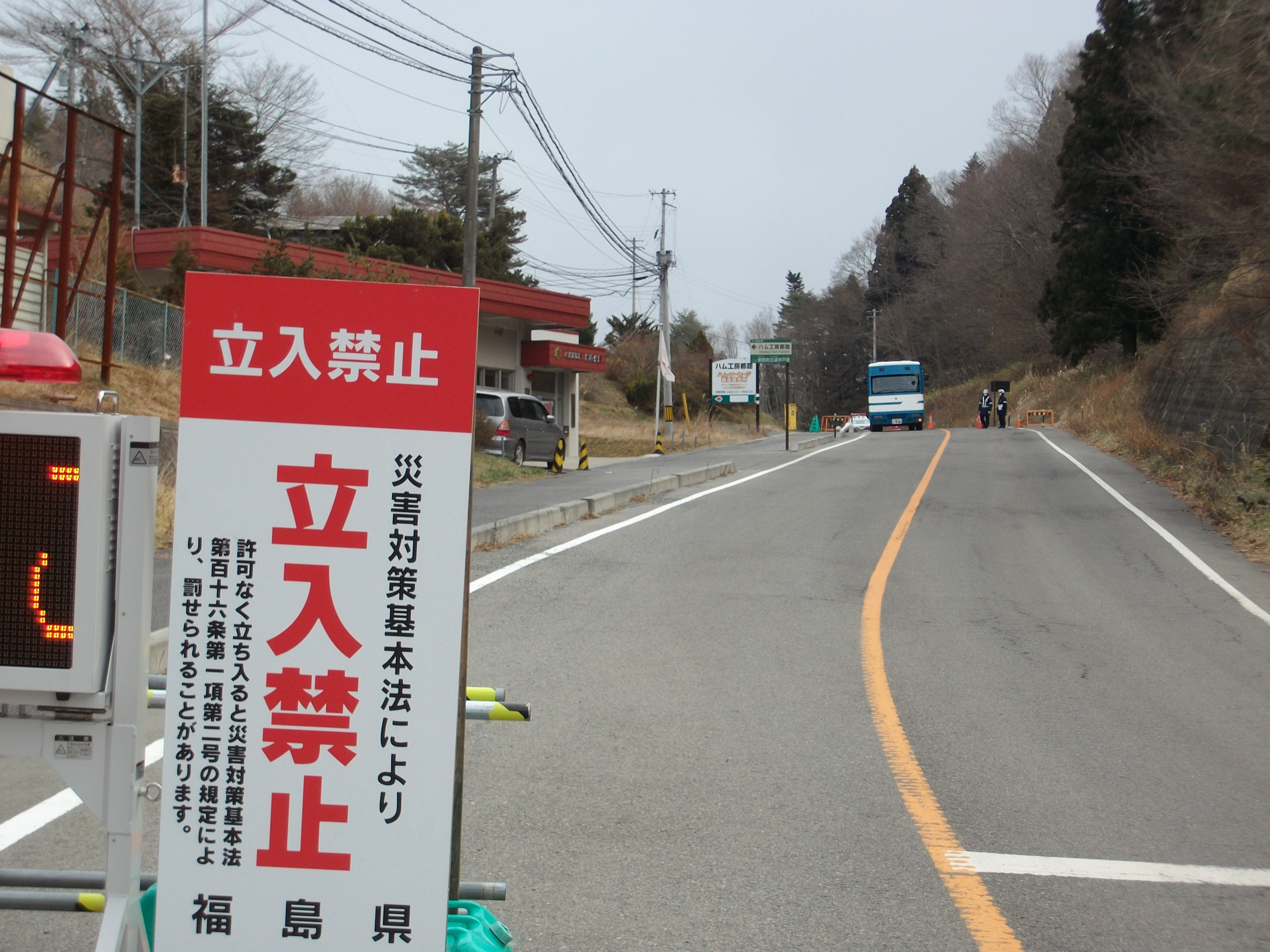 福島県田村市都路町古道 田村消防署都路分署前 「半径20km圏」規制に基づく検問所